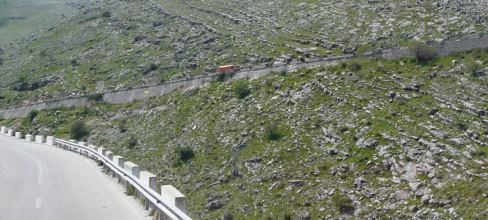 Road from Gjirokastër to Saranda in Albania climbing up Muzina pass